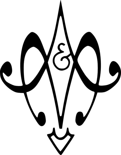 Le logo/blason traditionnel des Gadzarts dans sa version ornementé ( Zaloeil ).